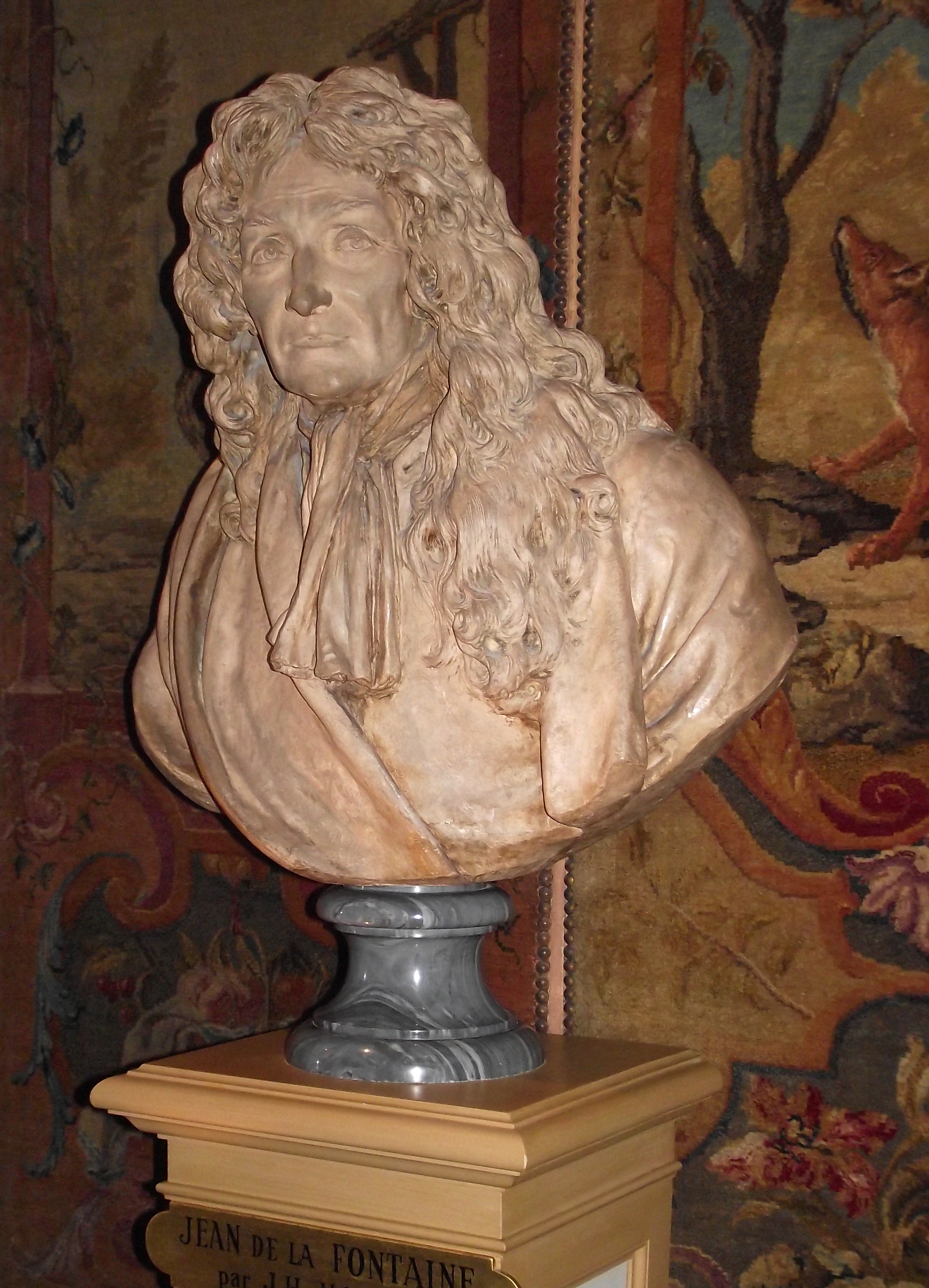 Buste de Jean de la Fontaine par Houdon.